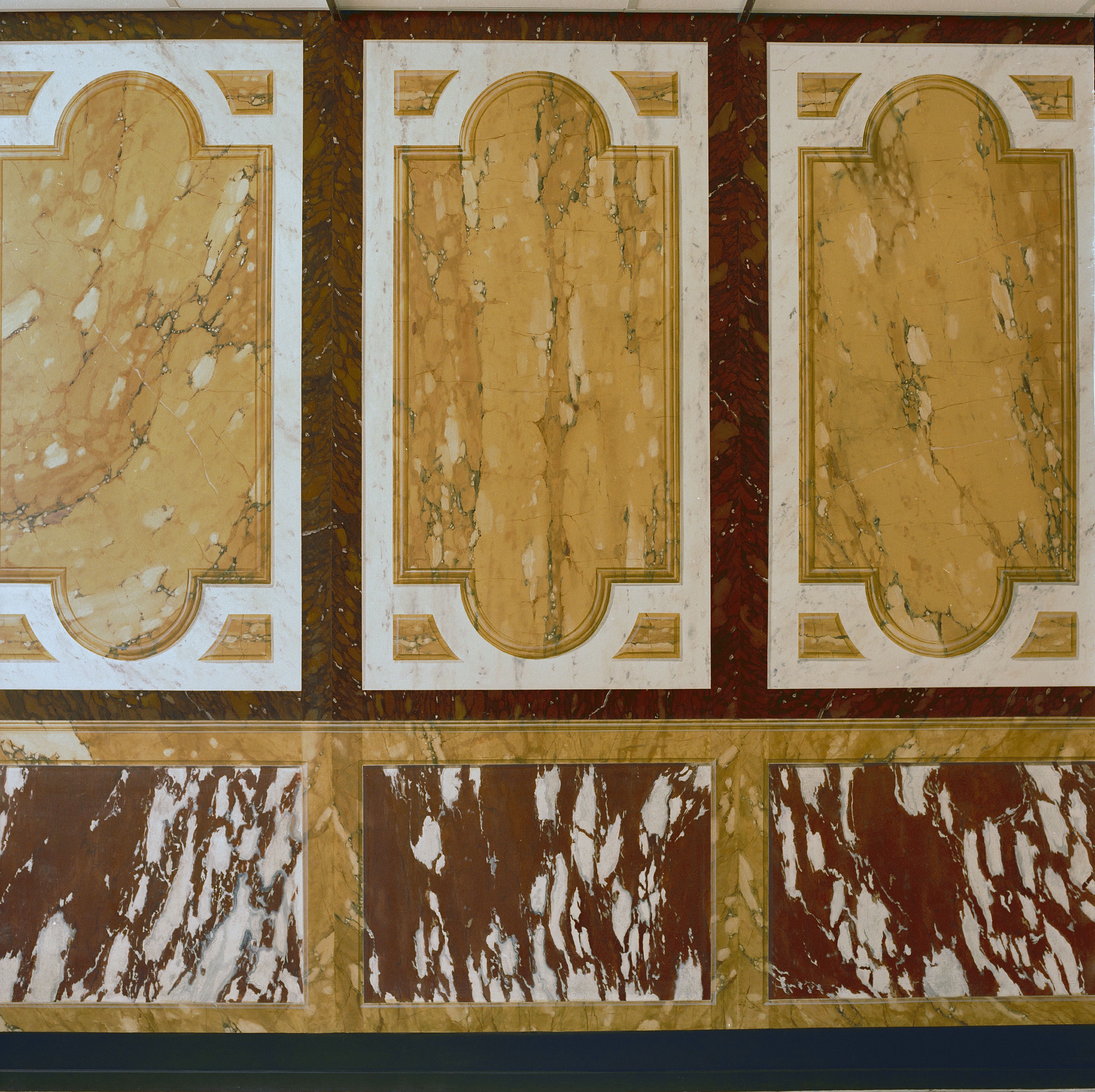 Imitatie/ Marmerimitatie: Marmerimitatie met trompe l'oeil; van binnen naar buiten: Jaune de Siena, wit marmer, Griotte d'Italia (opmerking: Gefotografeerd voor de kaft van het Restauratievademecum bijdrage 13: Schilder- en Verfkunst.)